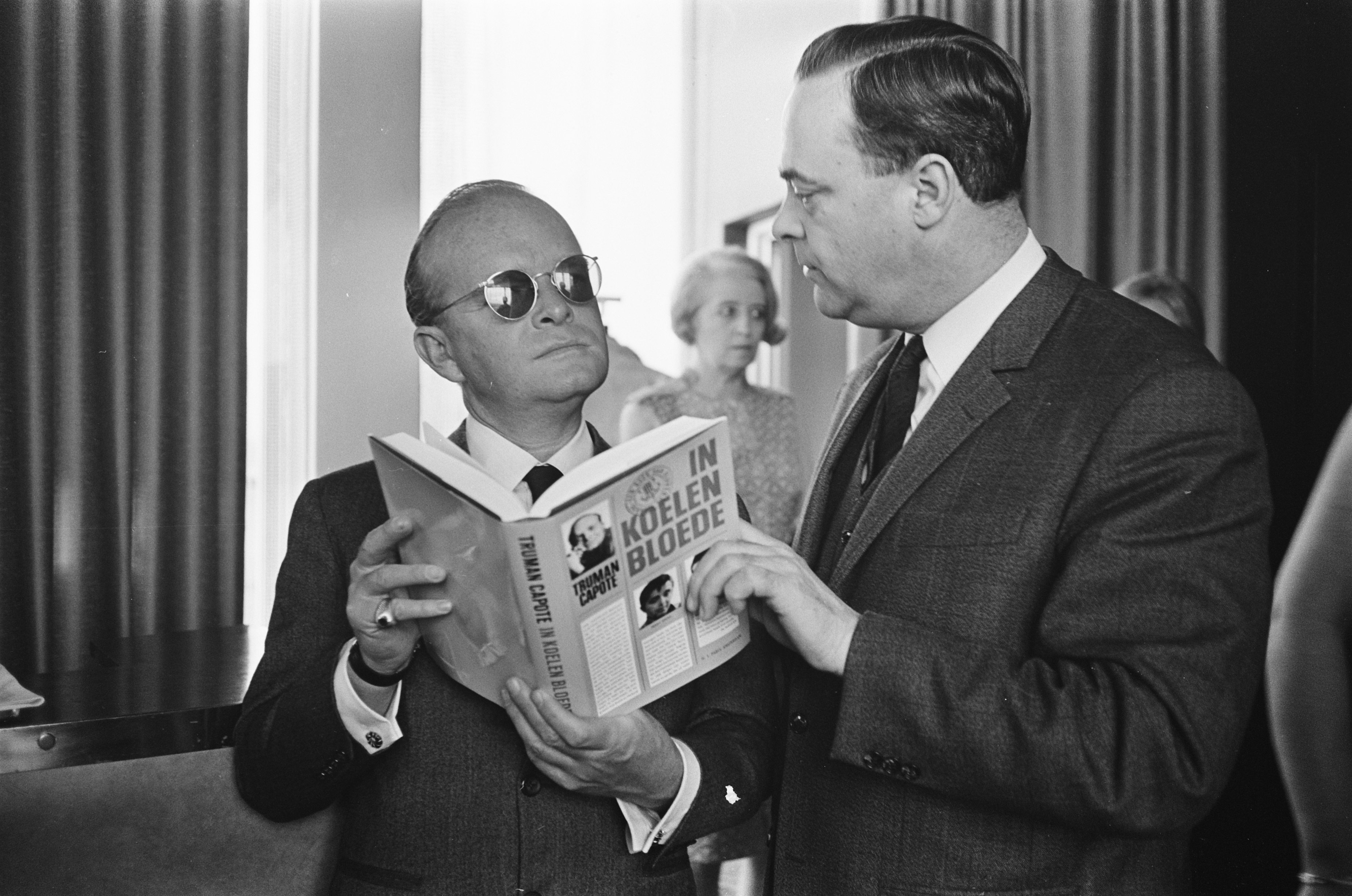 Collectie / Archief : Fotocollectie Anefo Reportage / Serie : [ onbekend ] Beschrijving : Filmpremiere in Du Midi, "In Koelen Bloede" ("In Cold Blood") naar het boek van Truman Capote. De schrijver (links) toont zijn boek Datum : 14 maart 1968 Locatie : Amsterdam, Noord-Holland Trefwoorden : auteurs, bioscopen, boeken, films, premieres, regisseurs, schrijvers Persoonsnaam : Capote, Truman Instellingsnaam : Du Midi Fotograaf : Koch, Eric / Anefo Auteursrechthebbende : Nationaal Archief Materiaalsoort : Negatief (zwart/wit) Nummer archiefinventaris : bekijk toegang 2.24.01.05 Bestanddeelnummer : 921-1637